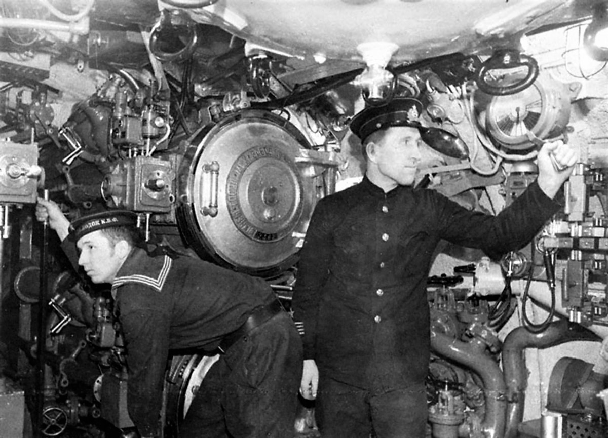 Краснофлотец А.В. Абрамов и старшина группы Ф.Д. Фокин в торпедном отсеке подводной лодки Щ-309